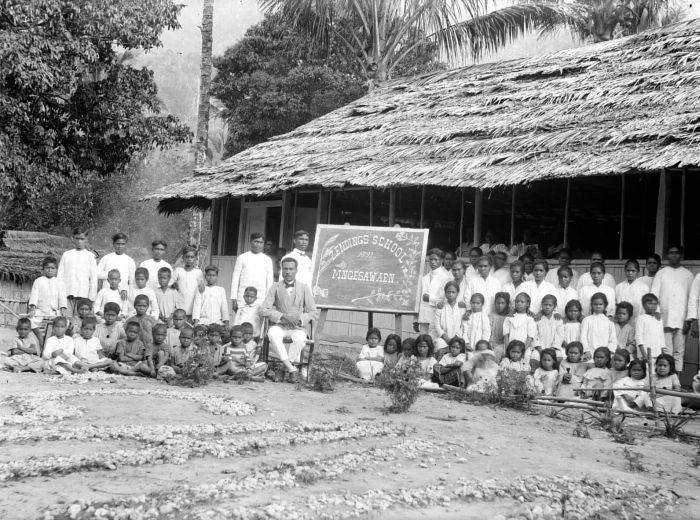 Negatief. Zendingsschool te Waikatin op Buru.